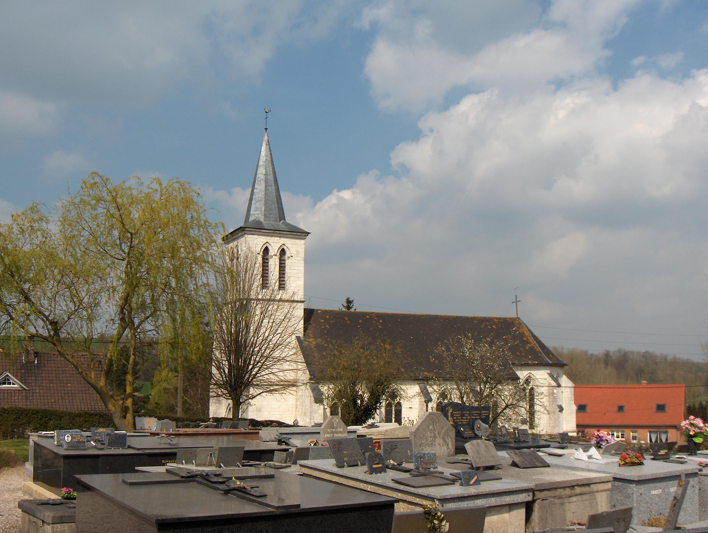 Ouve-Wirquin, Liebfrauenkirche (église Notre-Dame), Frankreich (Pas-de-Calais), neugotisch 19. Jh.